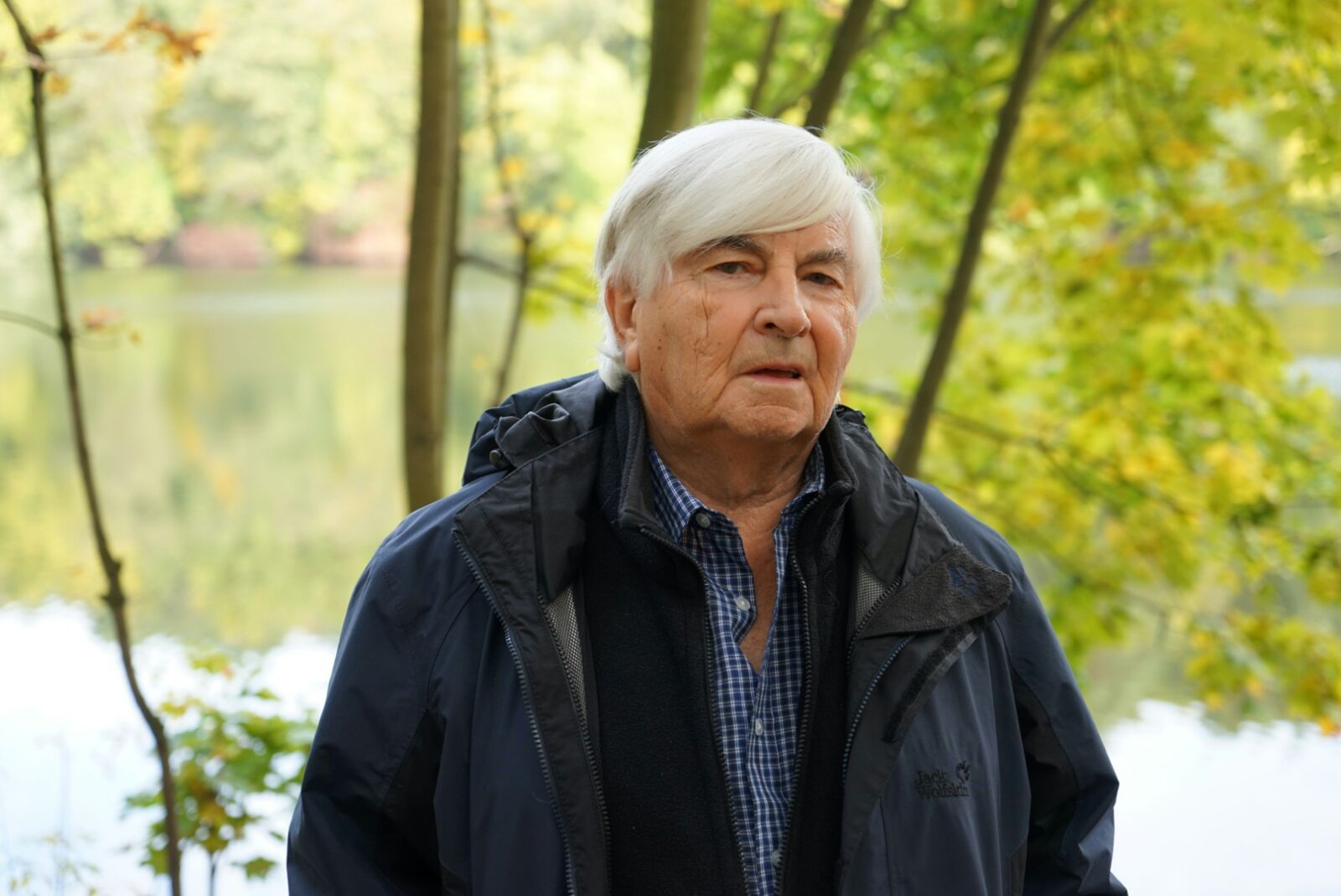 Prof. Karsten Thiessen Schlachtensee